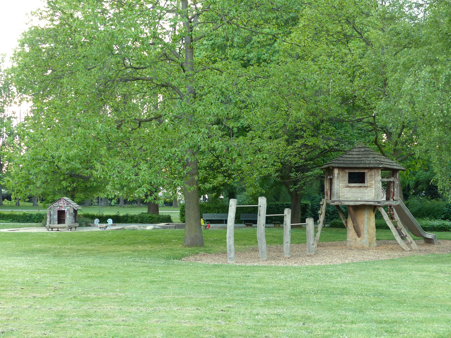 Spielbereich im Hermann-Löns-Park.